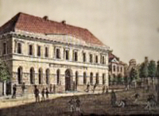 Johanneum Lüneburg, Bau von 1828/1829, nördlich der St. Johanniskirche (heute J.-Rabeler-Schule)